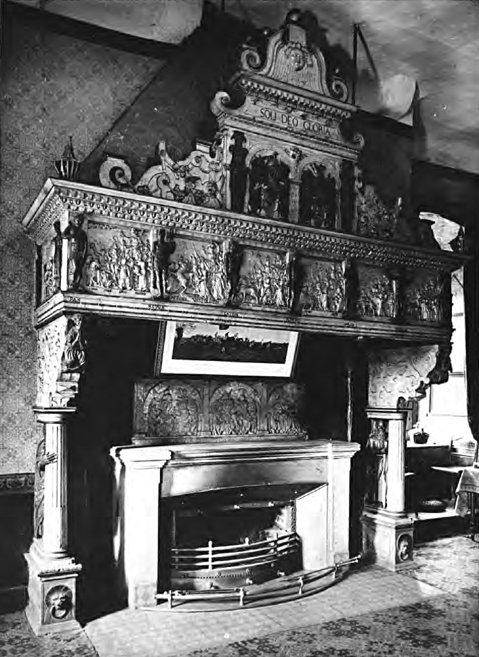 Renaissancekamin im Festsaal des Hauses Goldschmieding, Castrop-Rauxel